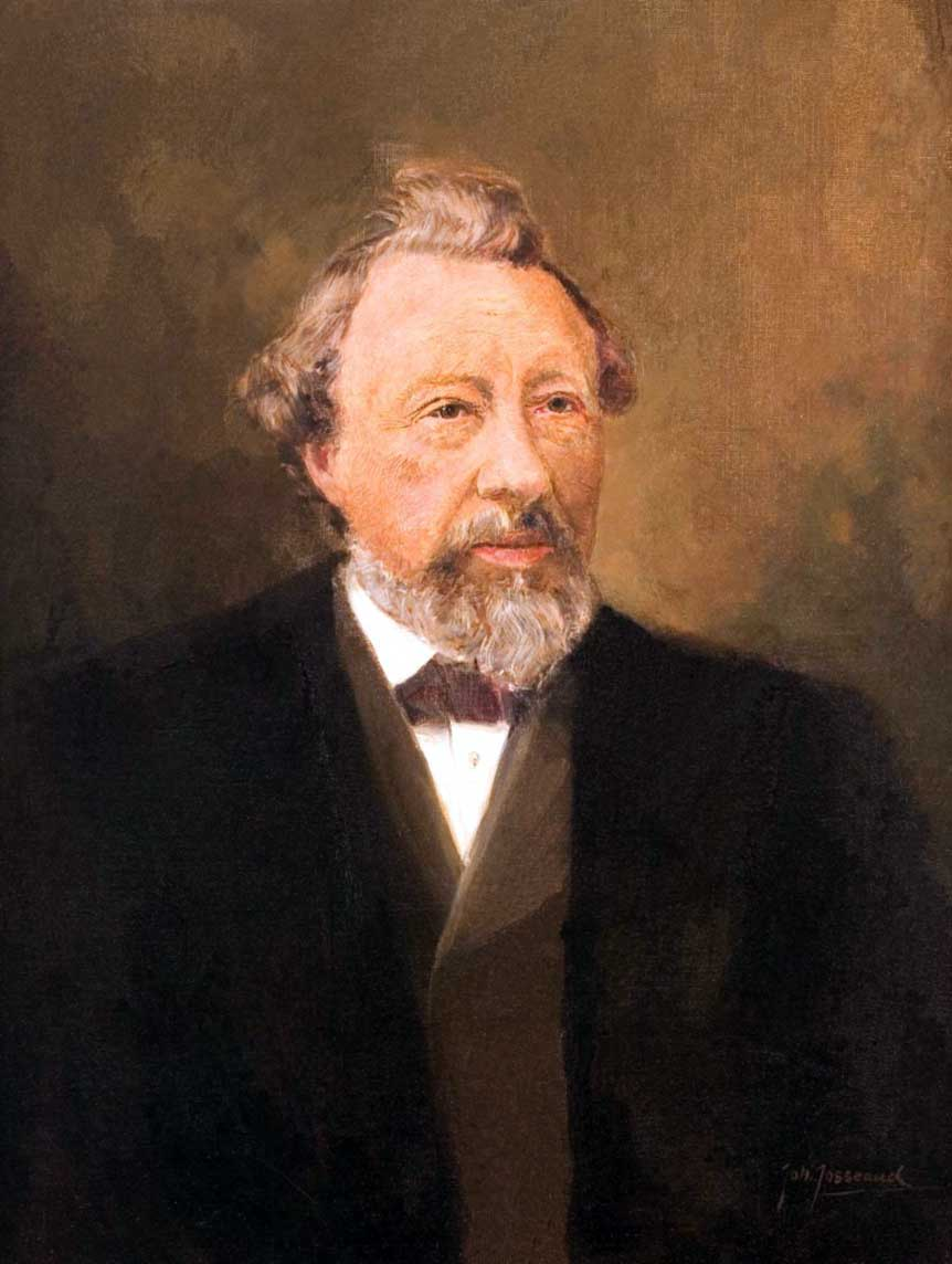 Leids hooglerarenportet van Johan Hendrik Caspar Kern, hoogleraar Sanskrit en Vergelijkende Taalkunde te Leiden